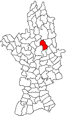 Categorie:Hărţi ale judeţului Olt